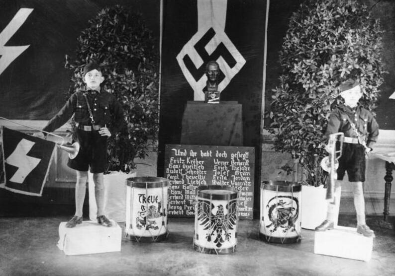 Hitlerjugend, Ehrenwache für Gefallene Hitlerjugend, Deutsches Jungvolk (Pimpfe).- Ehrenwache für Gefallene, zwei Hitlerjungen mit Trompete vor einer Hitlerbüste und Hakenkreuzfahne.